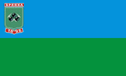 Прапор Брянки